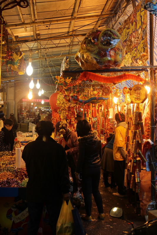 迪化街--景 Dihua Street